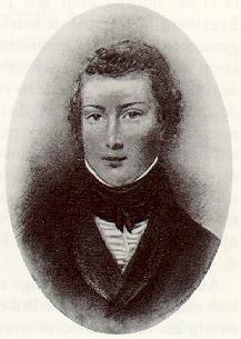 Thomas Ainsworth war ein in England geborener und in den Niederlanden gestorbener Textilindustrieller.